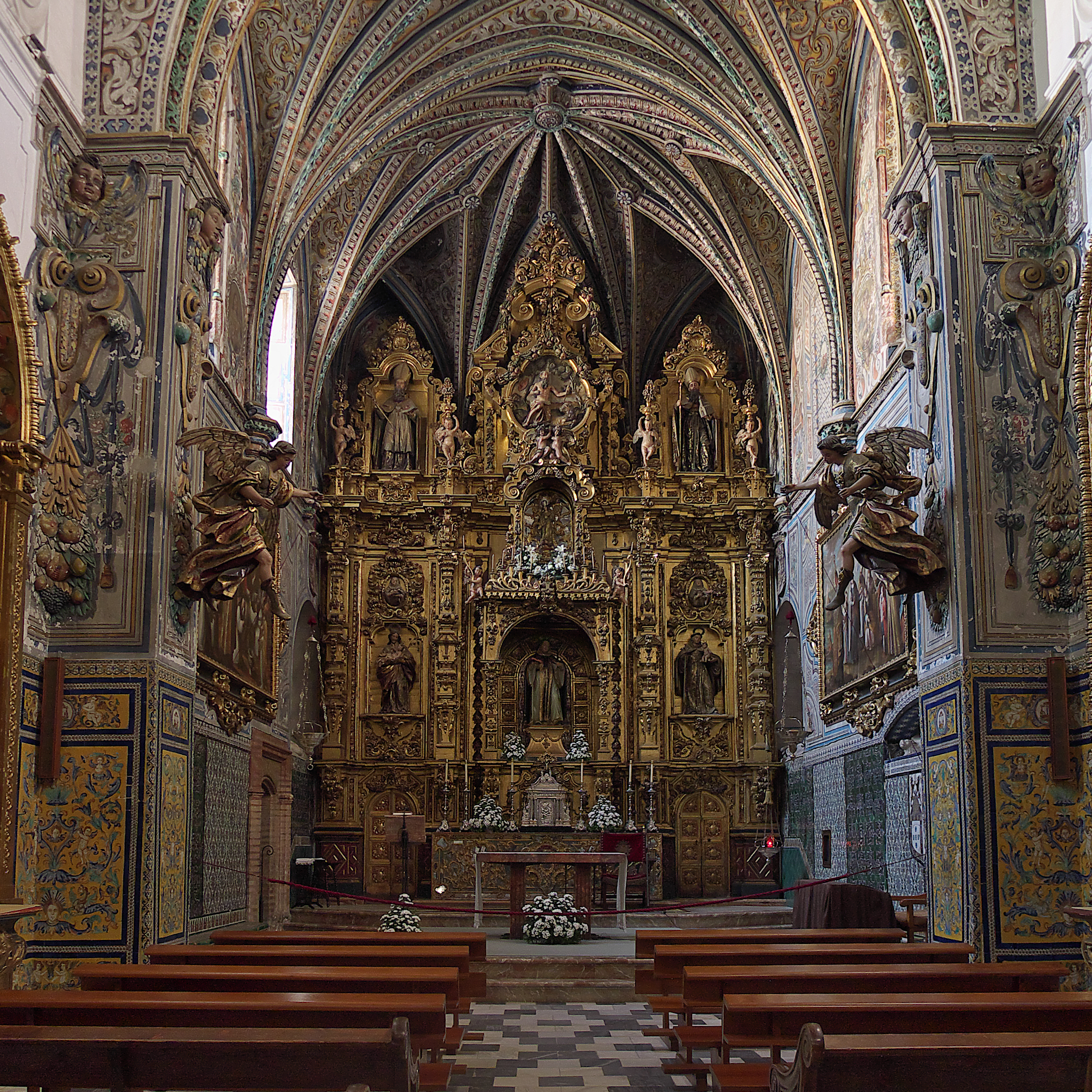 El retablo mayor es obra del escultor José Fernando de Medinilla (1730)